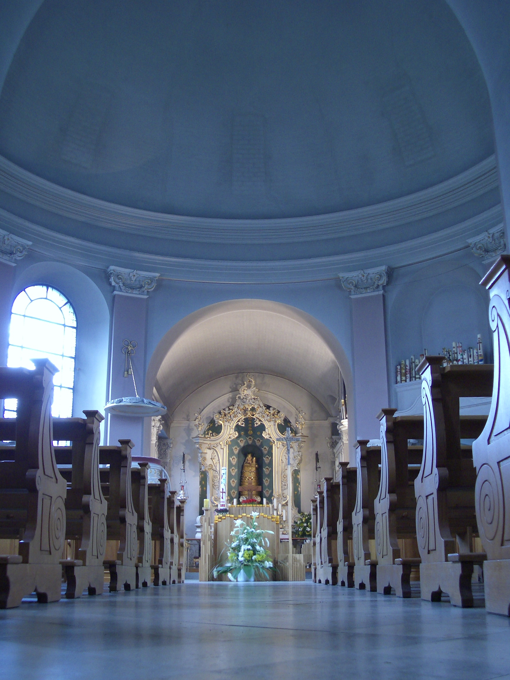 Innenansicht Dyckburg-Kirche, Münster